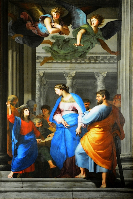 Jésus retrouvé au Temple par ses parents Jacques Stella, huile sur toile - 323 x 200 cm Les Andelys (Eure), collégiale Notre-Dame des Andelys